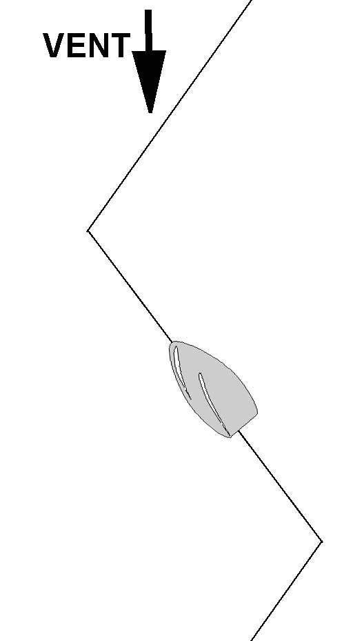 description : schéma louvoyage auteur : Pline réalisation personnelle